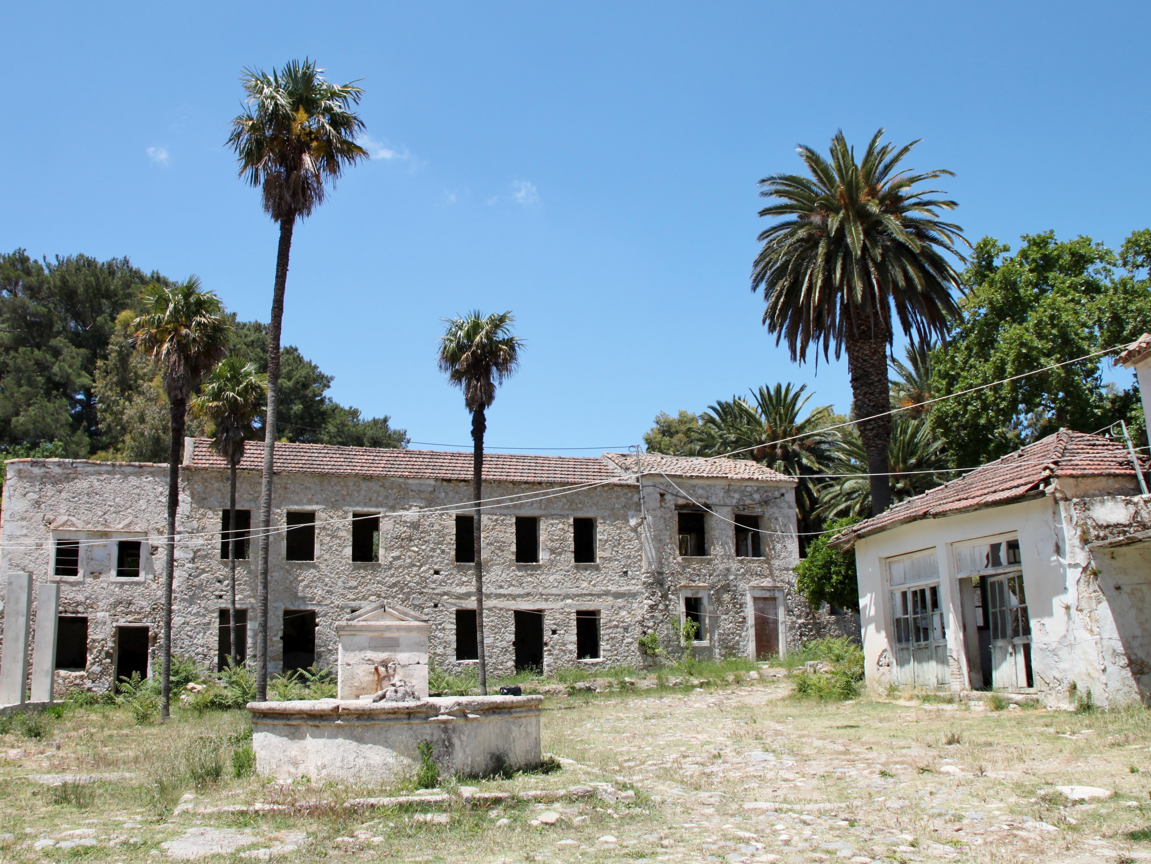 Kloster Moni Asomaton im Amari-Becken, Gemeinde Syvritos, Präfektur Rethymno, Kreta, Griechenland